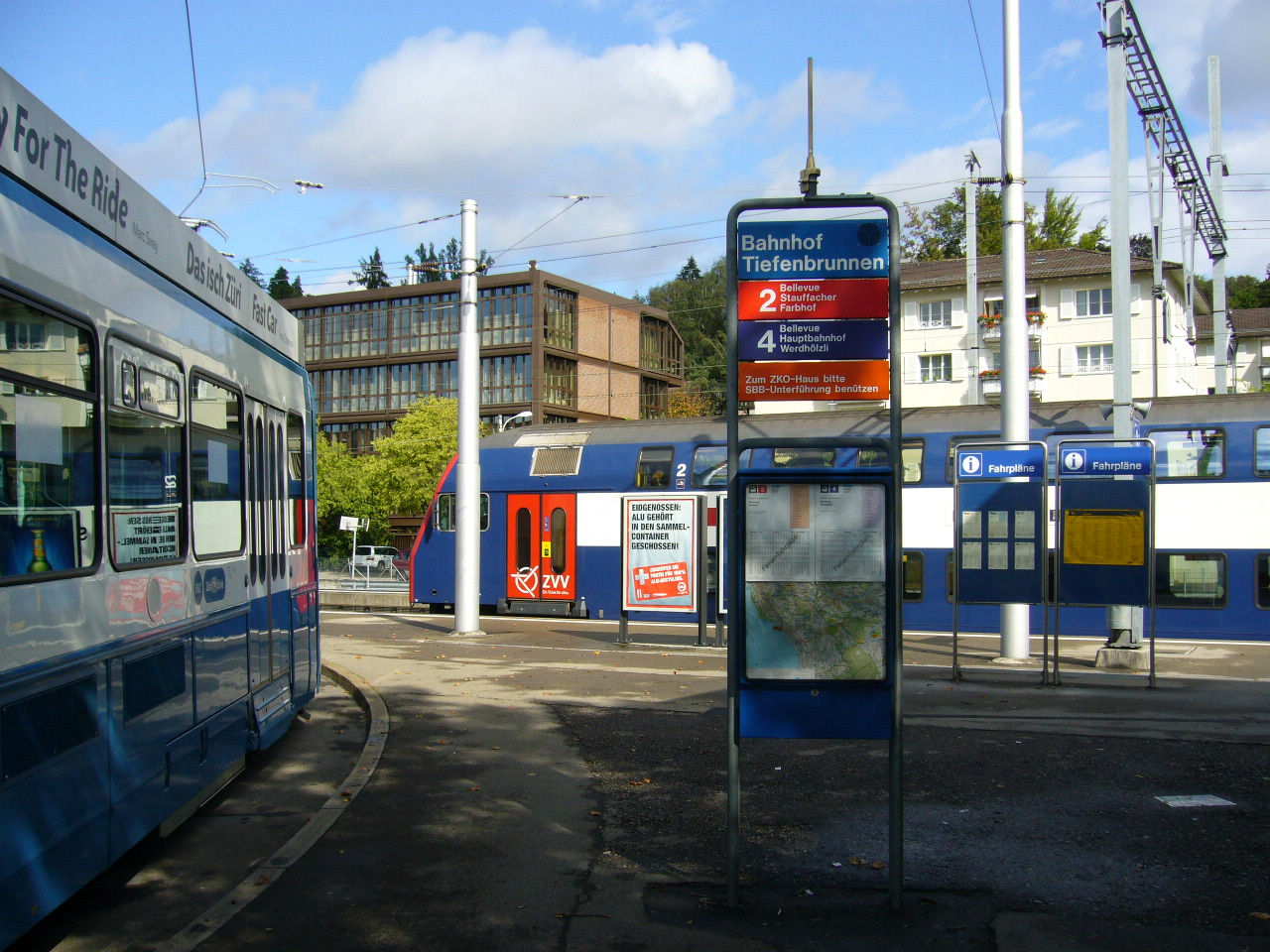 Train station Tiefenbrunnen in Zurich, Switzerland. Picture taken by Peter Berger, October 7, 2006.